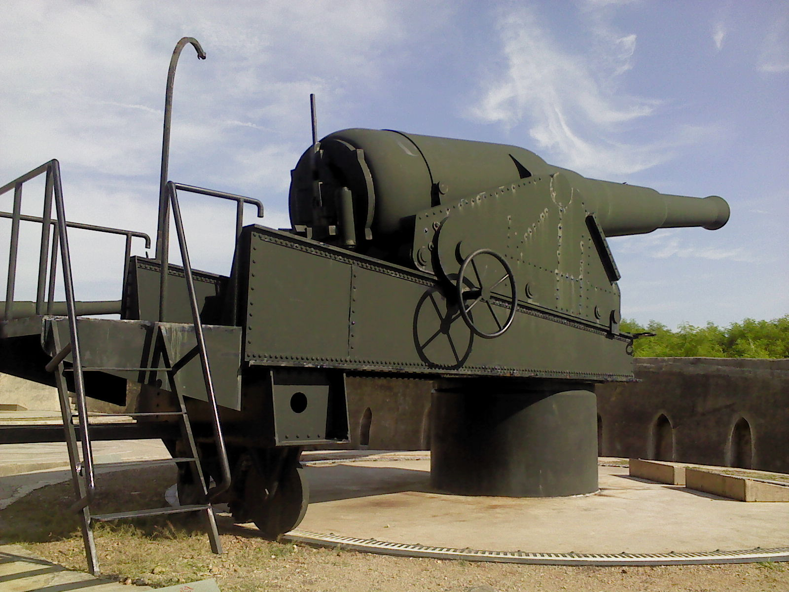 西嶼西臺展示之仿阿姆斯脫朗大砲